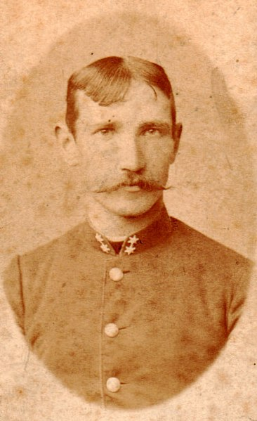 Zygmunt Zieliński w mundurze oberleutnanta c.k. armii. Skan fotografii wykonanej ok. 1883-1890 w Zakładzie Fotograficznym Stanisława Bizańskiego w Krakowie, Plac Szczepański 3 i przechowywanej w albumie rodzinnym.